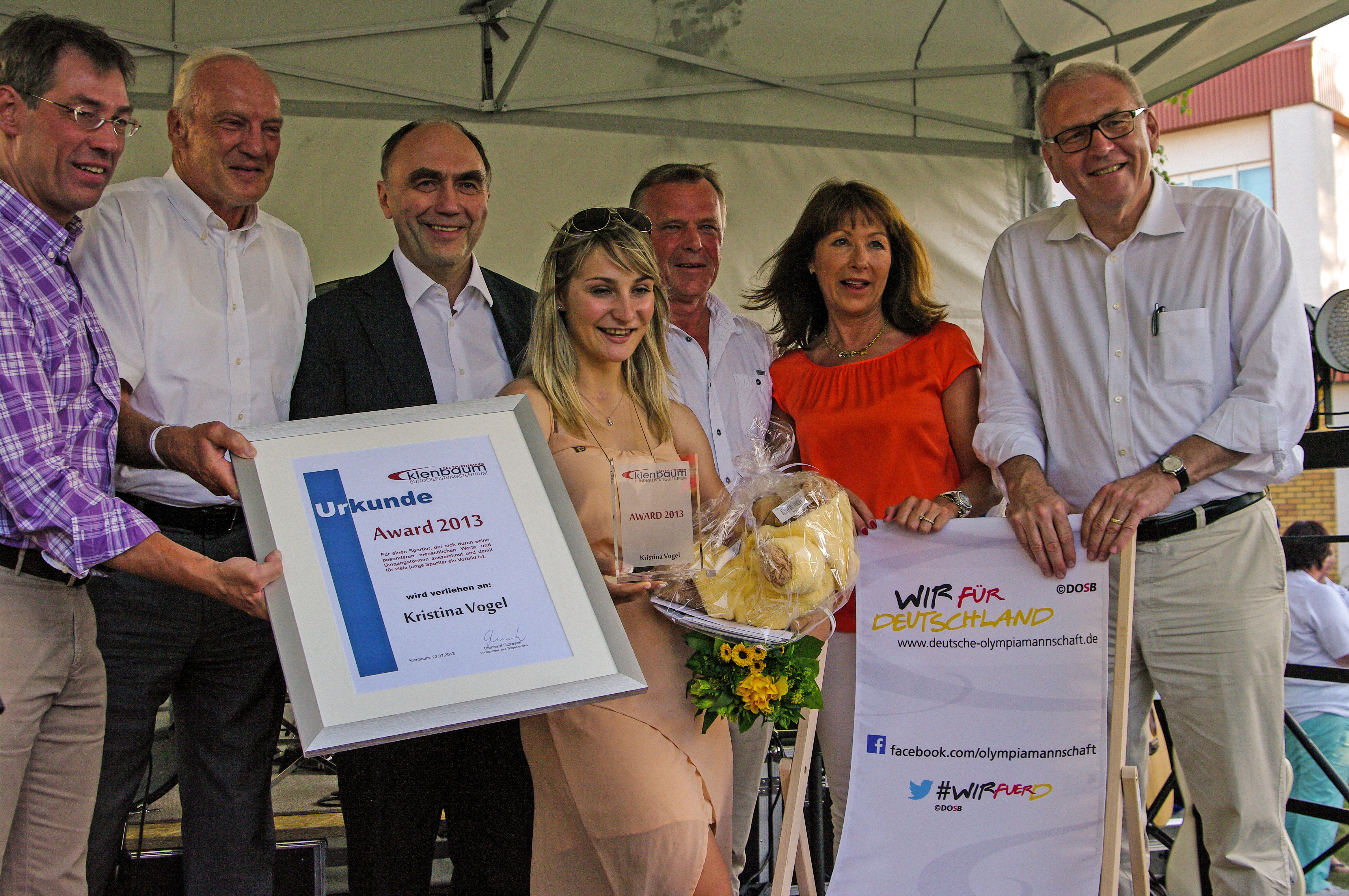 Medientag am 23. Juli 2013 im Bundesleistungszentrum Kienbaum, Verleihung Kienbaum Award 2013 an Kristina Vogel. v.l.n.r.:Bernhard Schwank, Heinz-Georg Moldenhauer, Christoph Bergner, Kristina Vogel, Klaus-Peter Nowack, Isolde Heinz, Michael Vesper